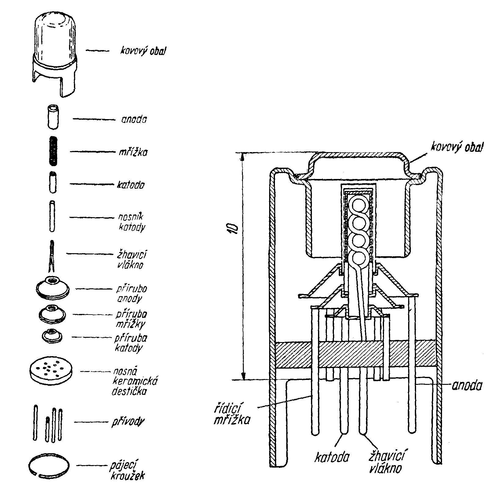 Nuvistor triode, cross section and and exploded wiev of system structure